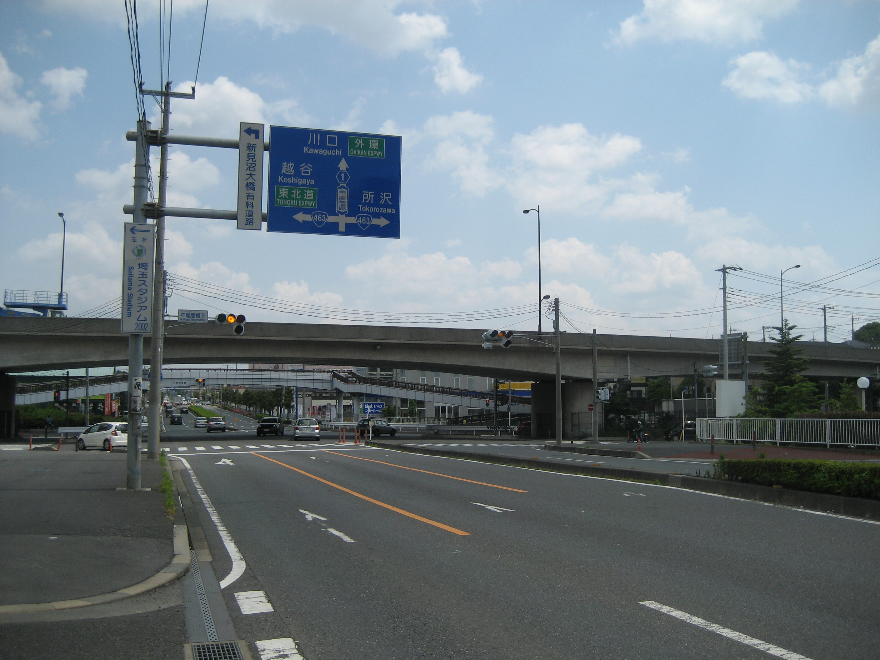 埼玉県道１号線さいたま市緑区中尾陸橋付近（国道４６３号線バイパスとの交差付近）